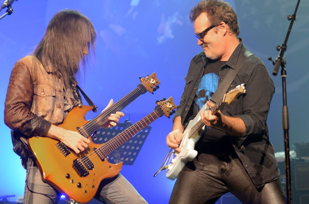 Ron et Axel